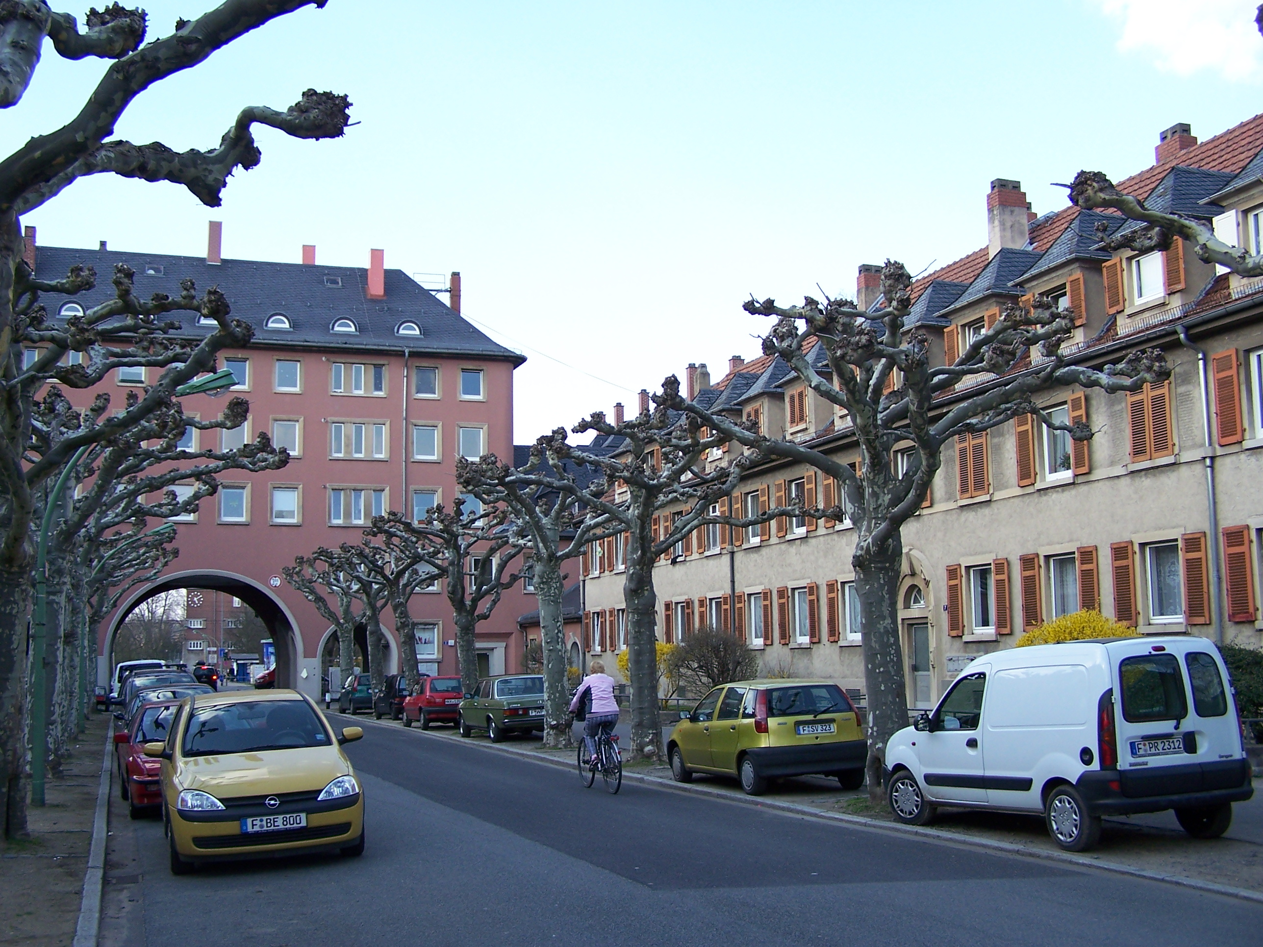 Schäfflestraße Richtung U-Bahnstation